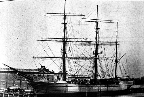 Velero argentino Oriana. Es hundido durante la Primera Guerra Mundial (6 de junio de 1917) de la guerra por el submarino alemán cerca de las orillas del archipiélago británico Scilly